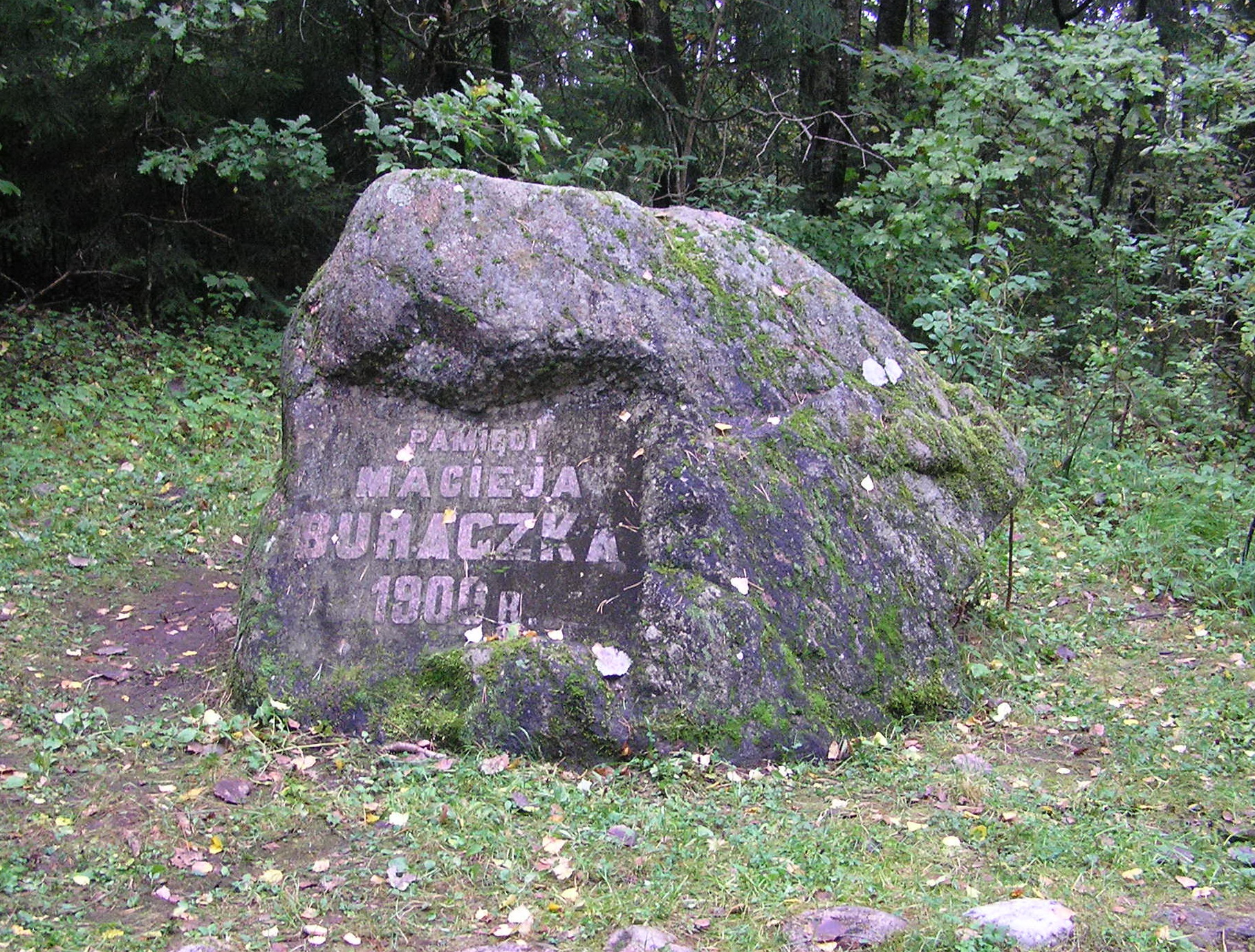 Беларуская (тарашкевіца): Камень Багушэвіча